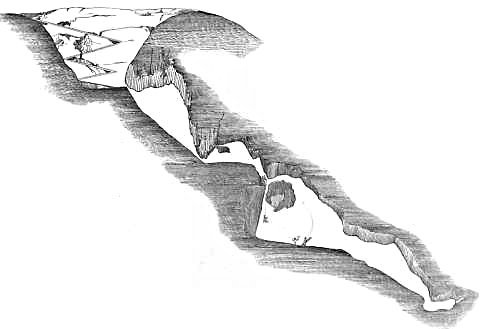 Grotta reogenitica dell'eruzione dell'Etna del 1669